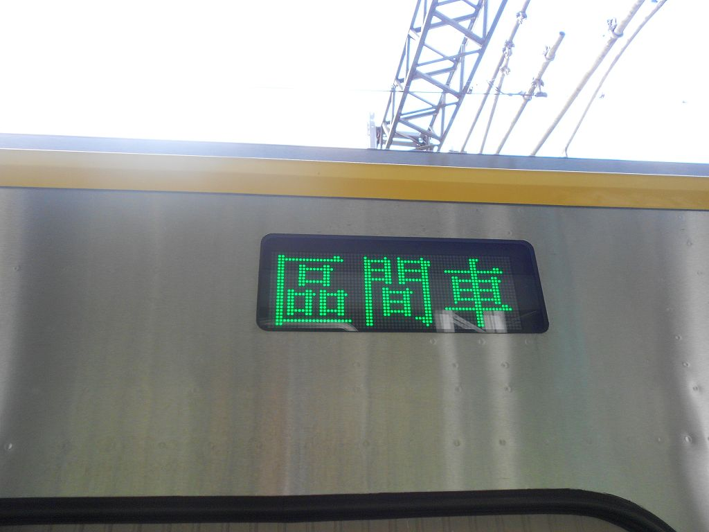 列車終站顯示器(DI)顯示